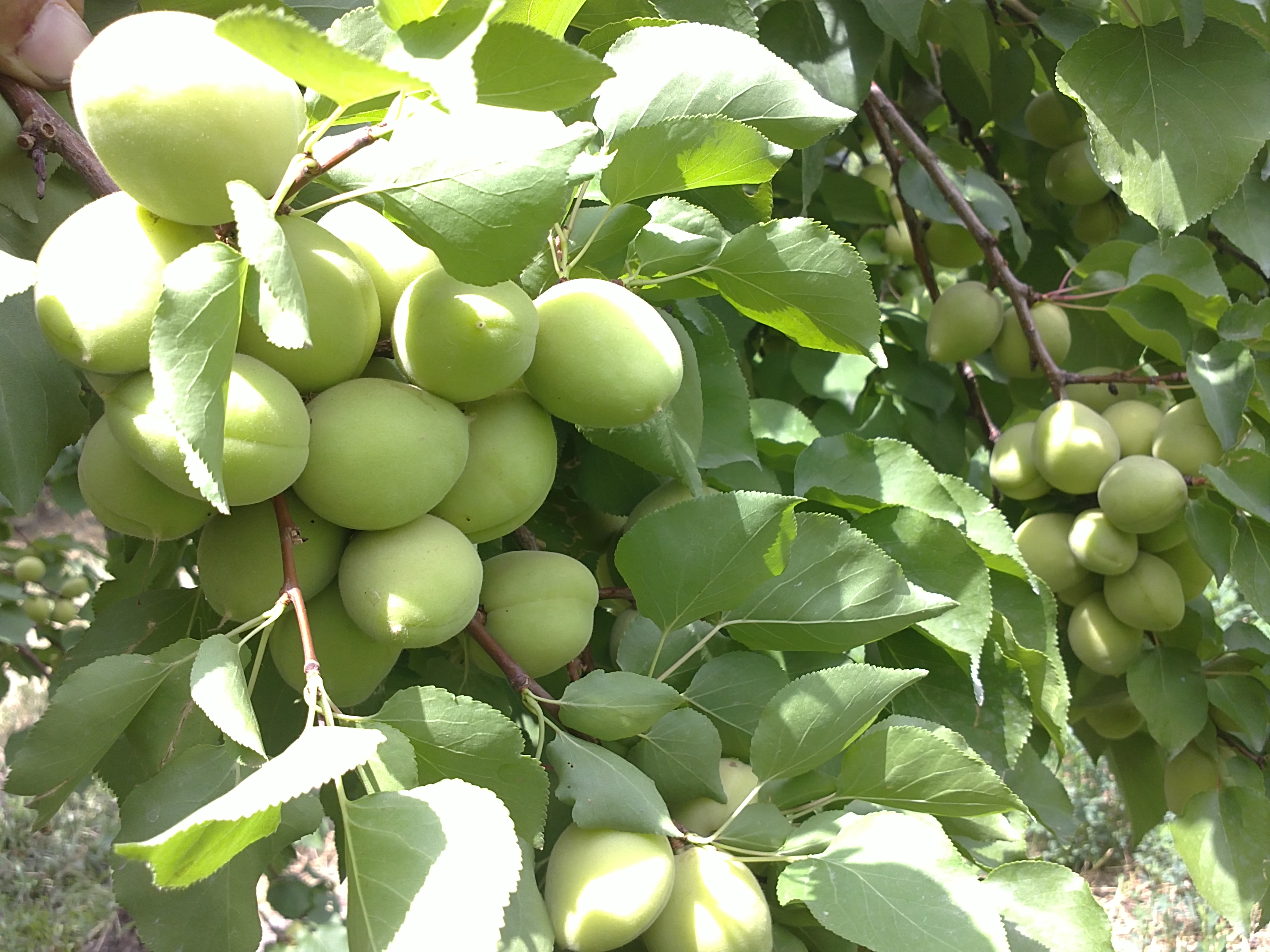 وقتی دستی نهالی می کارد و با امید آنرا می پرورد، خدا پاسخش را اینگونه میدهد!